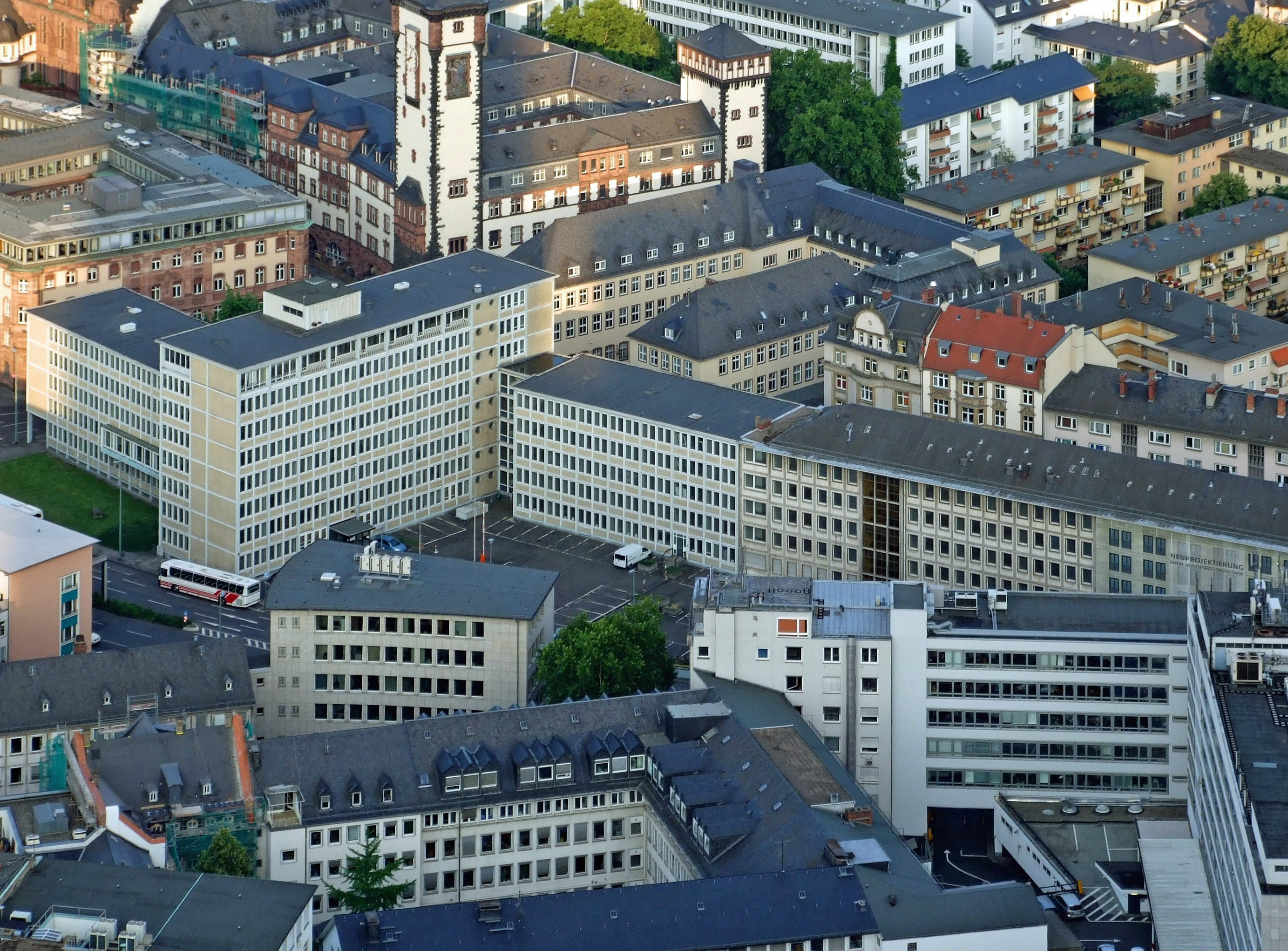 Der ehemalige Bundesrechnungshof-Komplex, zwischen Berliner und Braubachstrasse in Ffm